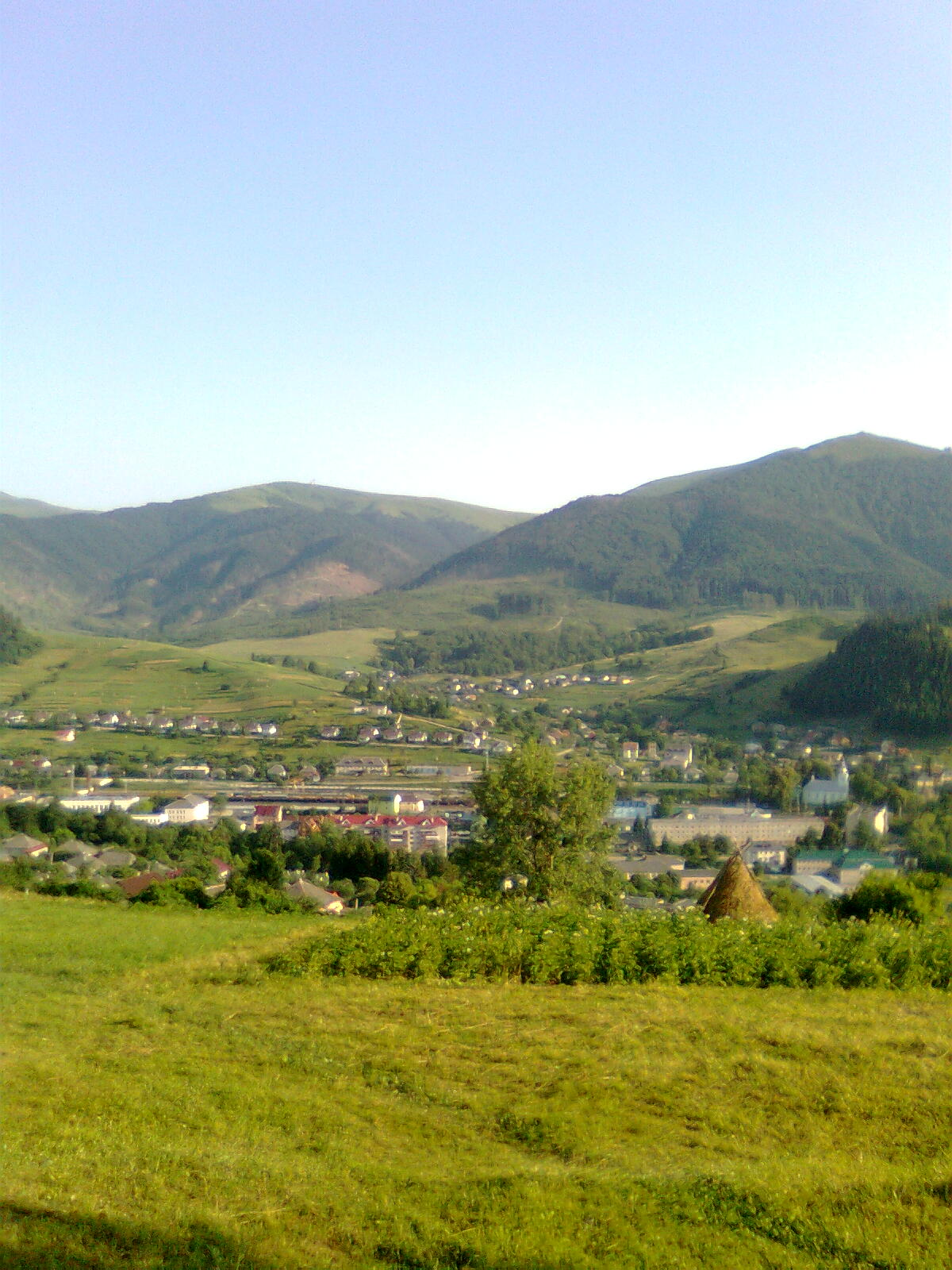 Volóc látképe (Ukrajna)